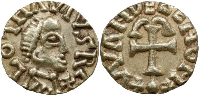 Tiers de sou de Clotaire III frappé à Paris (657-673). BNF, monnaies, médailles et antiques. Avers : Buste diadémé à droite. Revers : Croix ancrée.